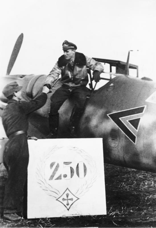 Günther Rall Der 250! Der Träger des Eichenlaubs mit Schwertern, Major Rall, verlässt nach seinem 250. Luftsieg seine Maschine. Der erste Gratulant ist der Wart des Majors, der ihn nun schon seit seinem 36. Abschuss von Feldflugplatz zu Feldflugplatz begleitet und seinen Teil still und unauffällig zu den Erfolgen seines Kommandeurs beitrug. 20.1.1944 [Herausgabedatum] [Pilot Major Günther Rall beim Aussteigen aus seinem Flugzeug Messerschmitt Me 109 nach seinem 250. Luftsieg Ende November 1943] Abgebildete Personen: Rall, Günther: Major, Ritterkreuz (RK), Luftwaffe, Generalleutnant, Inspekteur der Bundesluftwaffe, Bundesrepublik Deutschland (GND 124275990)